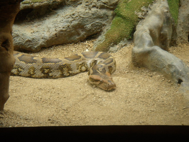 Esemplare di pitone delle rocce indiano allo zoo di Barcellona